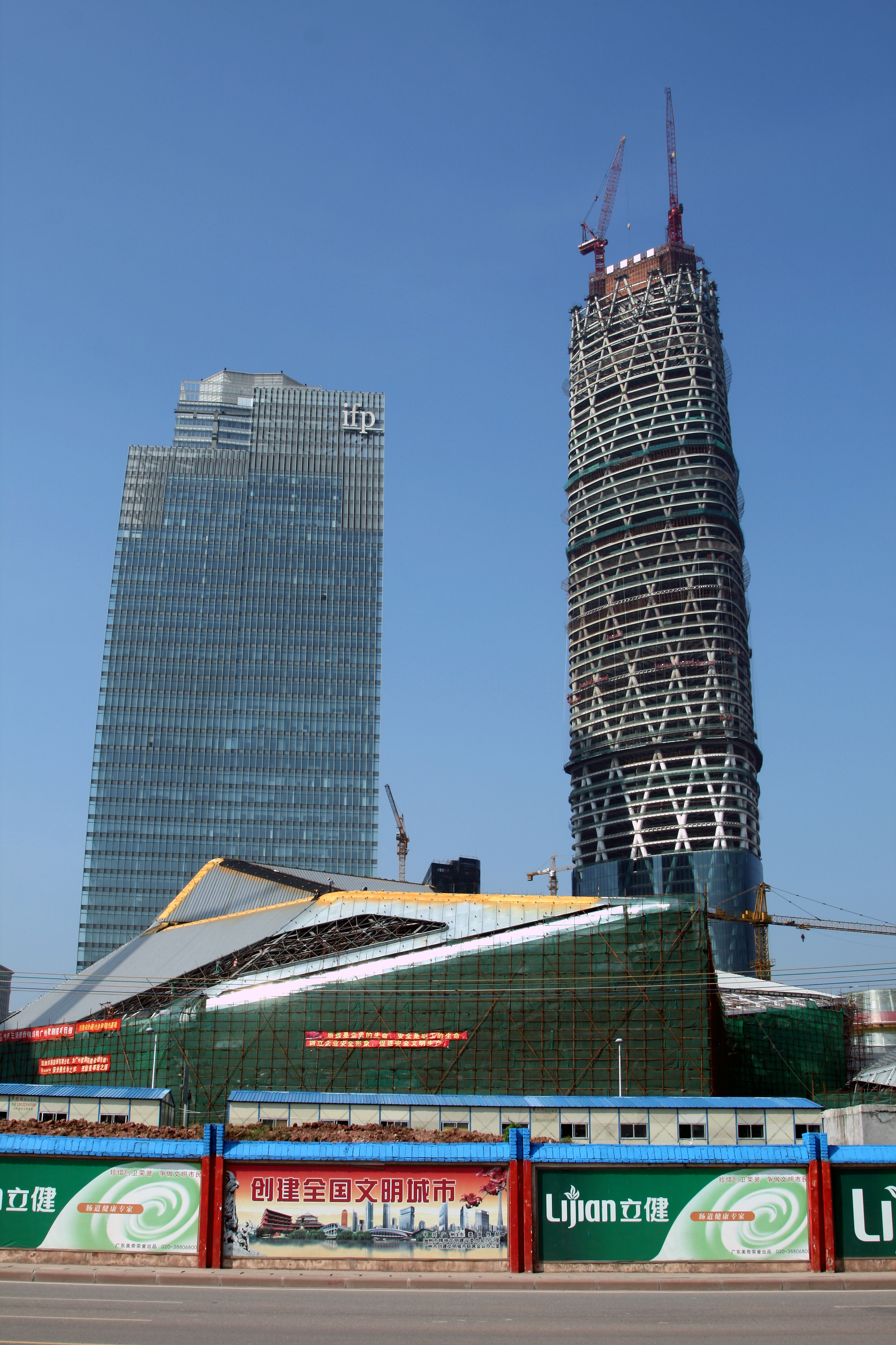 中文（中国大陆）: 广州的国际金融广场（左）和国际金融中心（右）